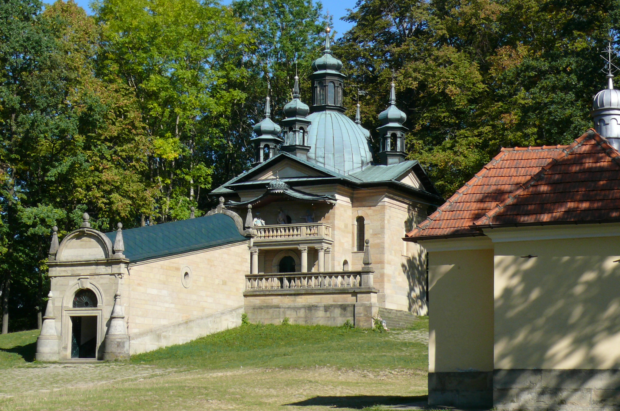 Sanktuarium pasyjno-maryjne w Kalwarii Zebrzydowskiej - Kaplica Ecce Homo